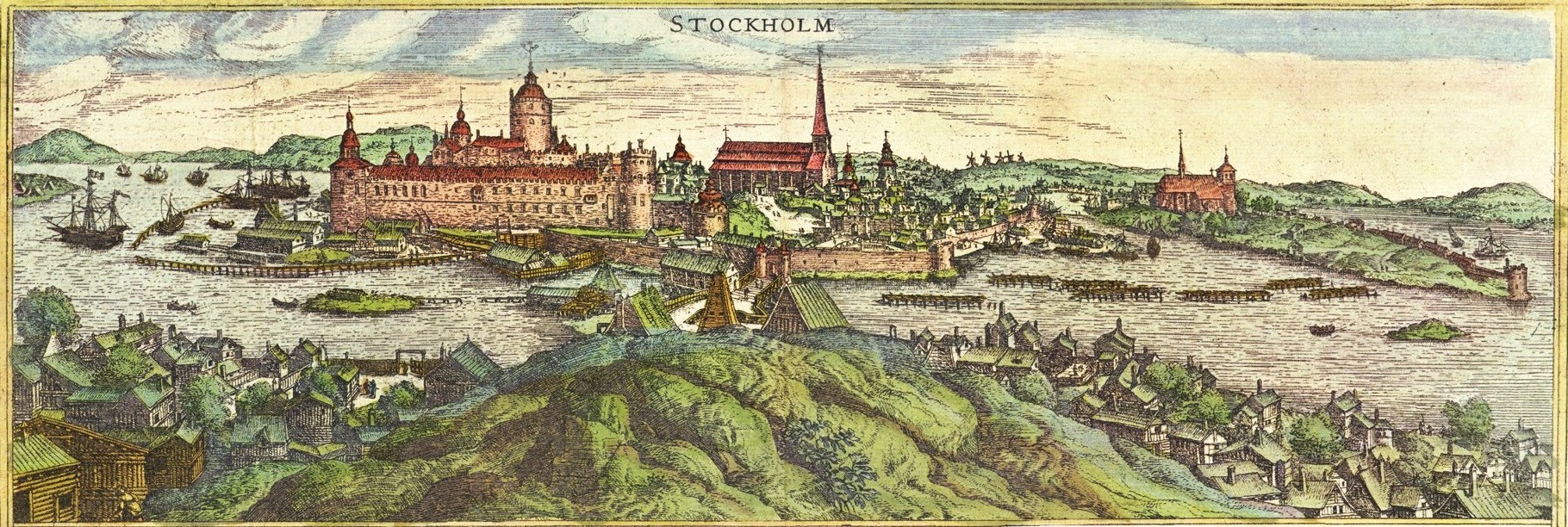 Stockholm viewed from north. Copperplate by Frans Hogenberg c. 1570.